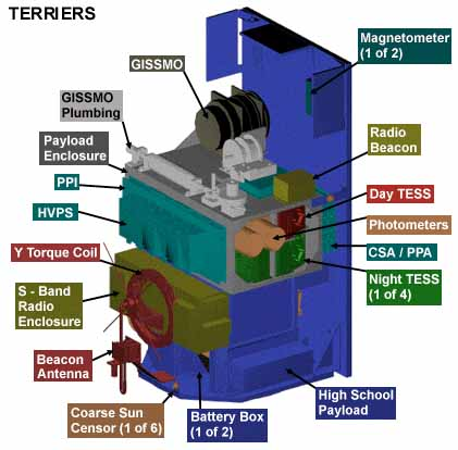 TERRIERS satellite